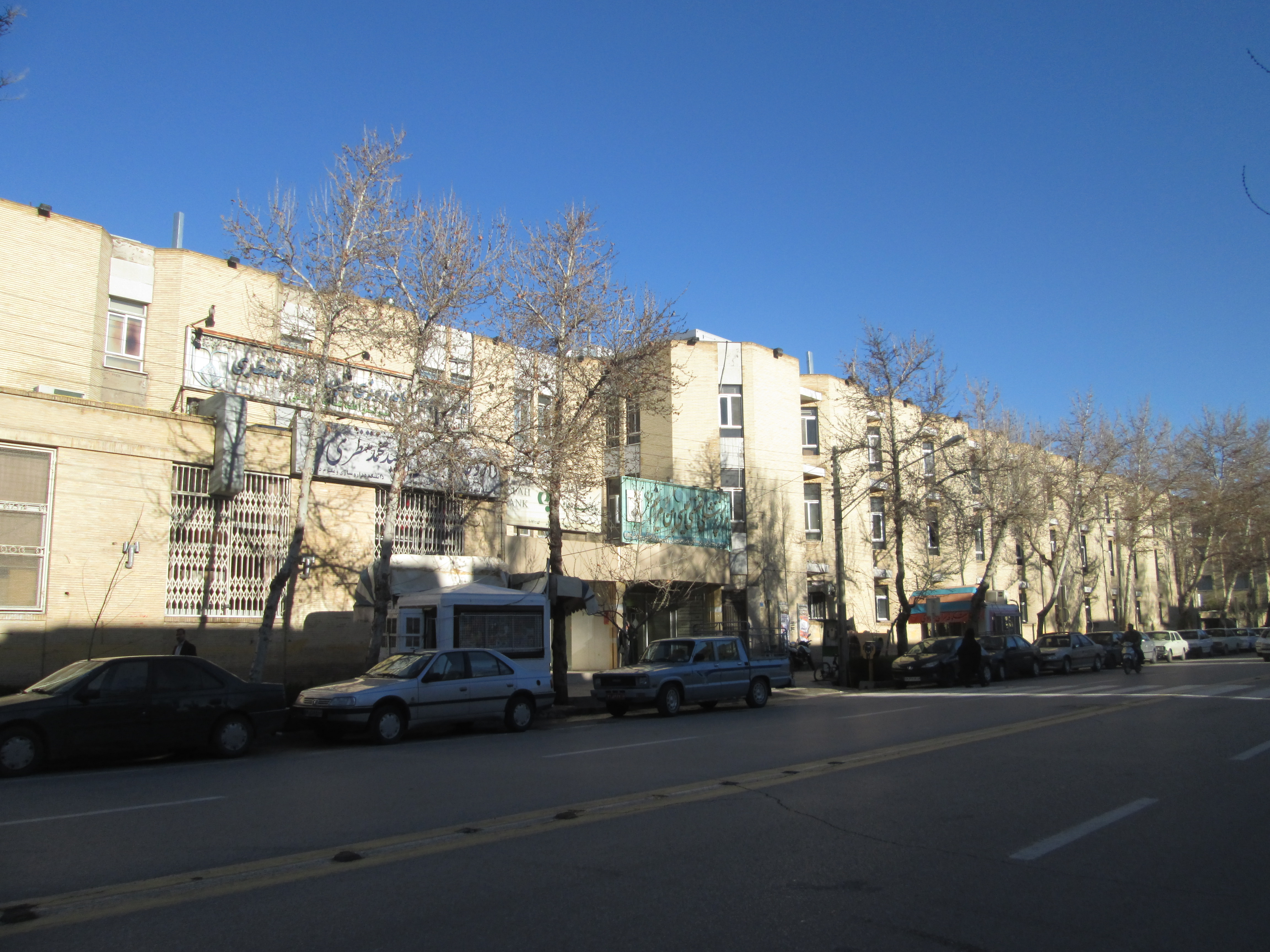 Christian hospital-بیمارستان مسیح، اصفهان، 1392 (2014)